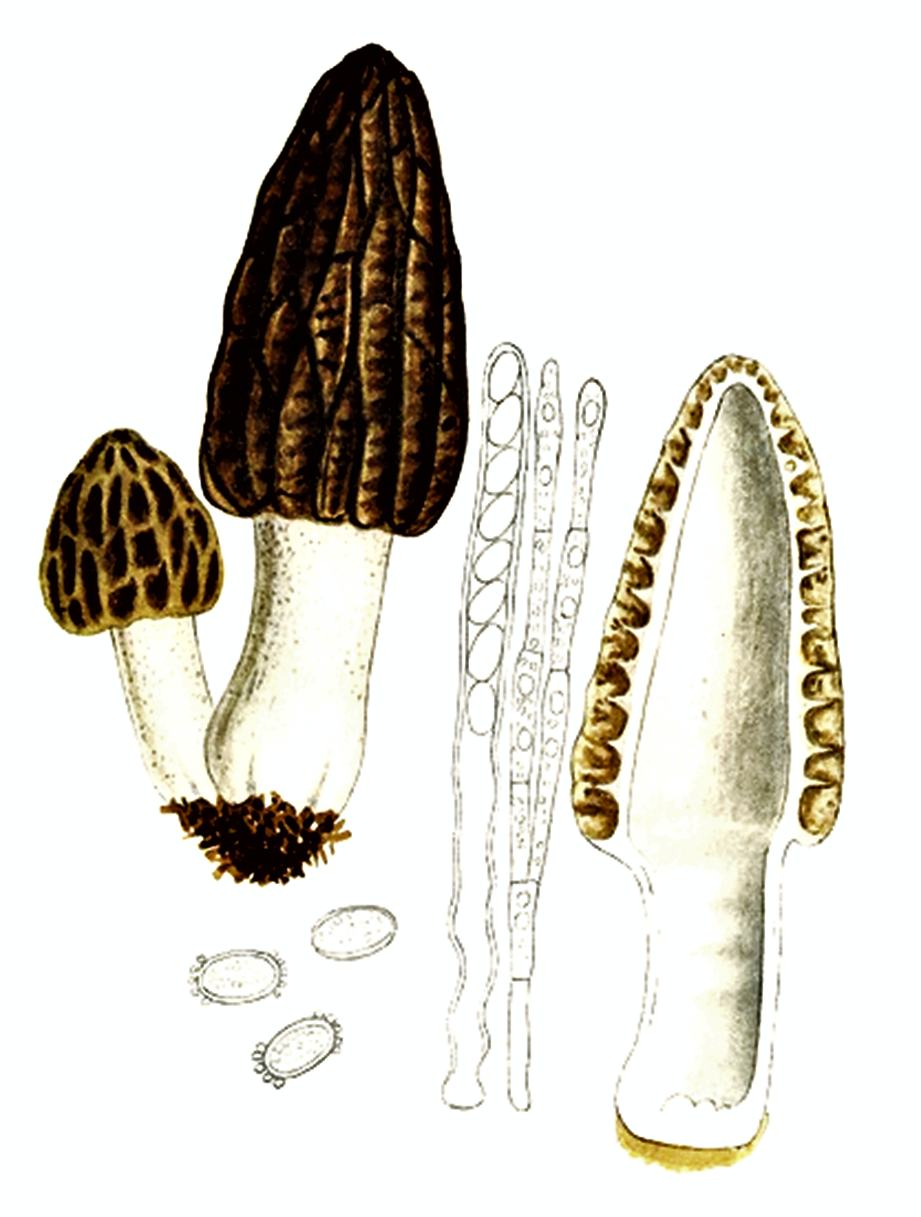 Giacomo Bresadola: Morchella conica Pers. (1818)